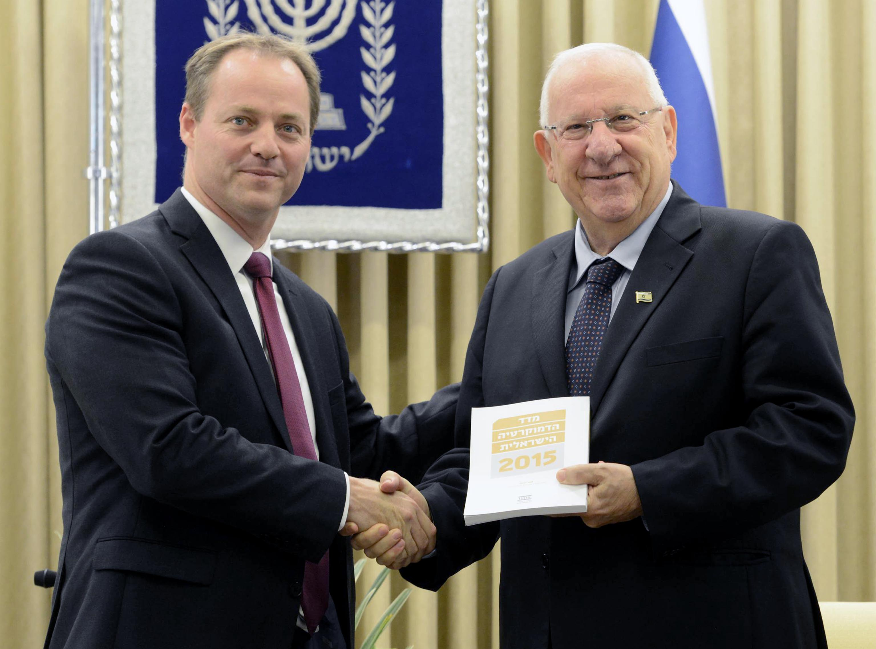 נשיא מדינת ישראל ראובן ריבלין מקבל את "מדד הדמוקרטיה הישראלית" לשנת 2015, מידיו של יוחנן פלסנר